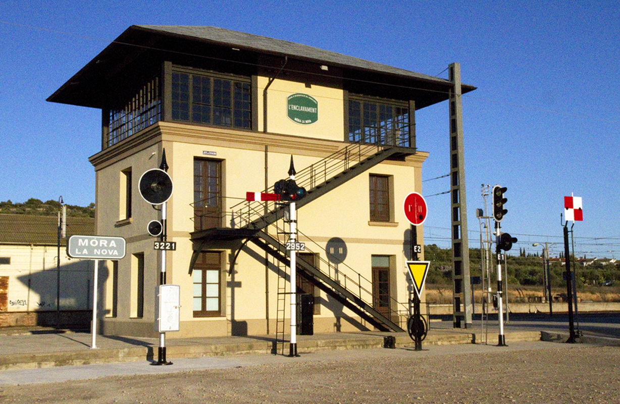 Enclavament Móra la Nova